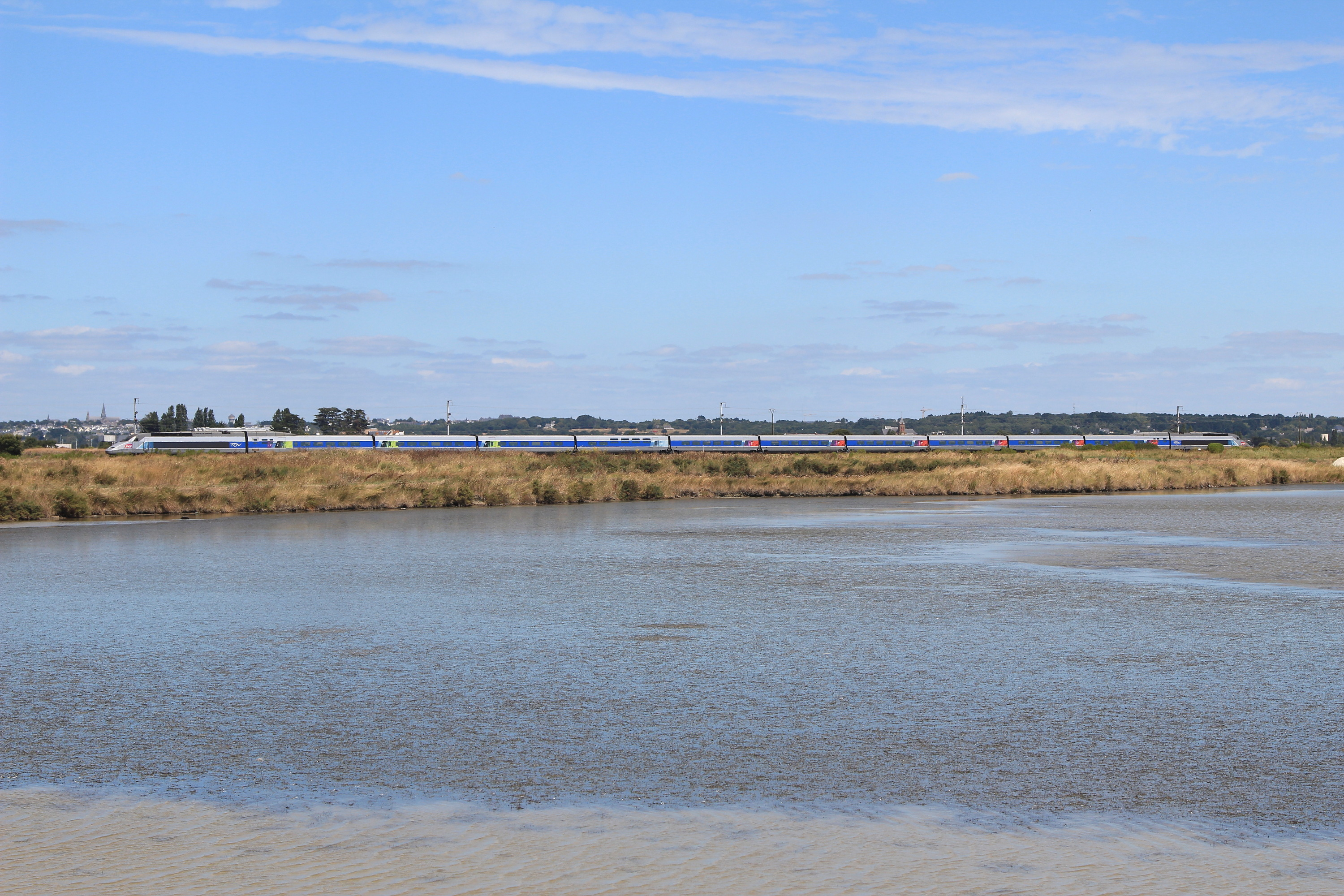 Une rame du TGV Atlantique entre Le Pouliguen et Batz-sur-Mer.